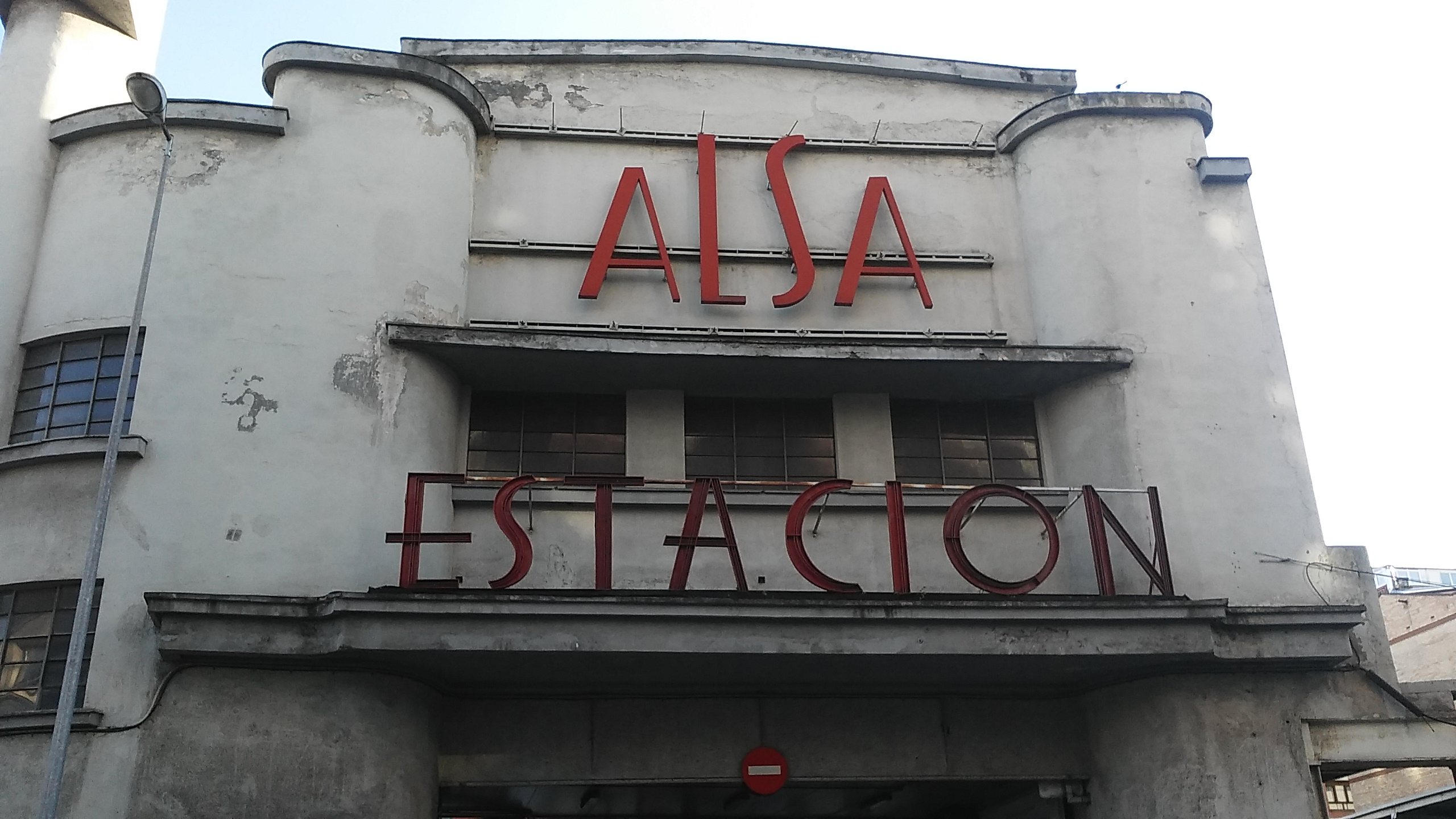 Fachada principal de la estación de autobuses Alsa, en Gijón.